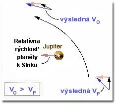 Popis: diagram kozmickej lode prelietajúcej okolo Jupitera vzhľadom k sústave súradníc Slnka Zdroj: Dátum: 28.2.2006 Autor: upravil Adrian Povolenie: PD Iné verzie tohto súboru